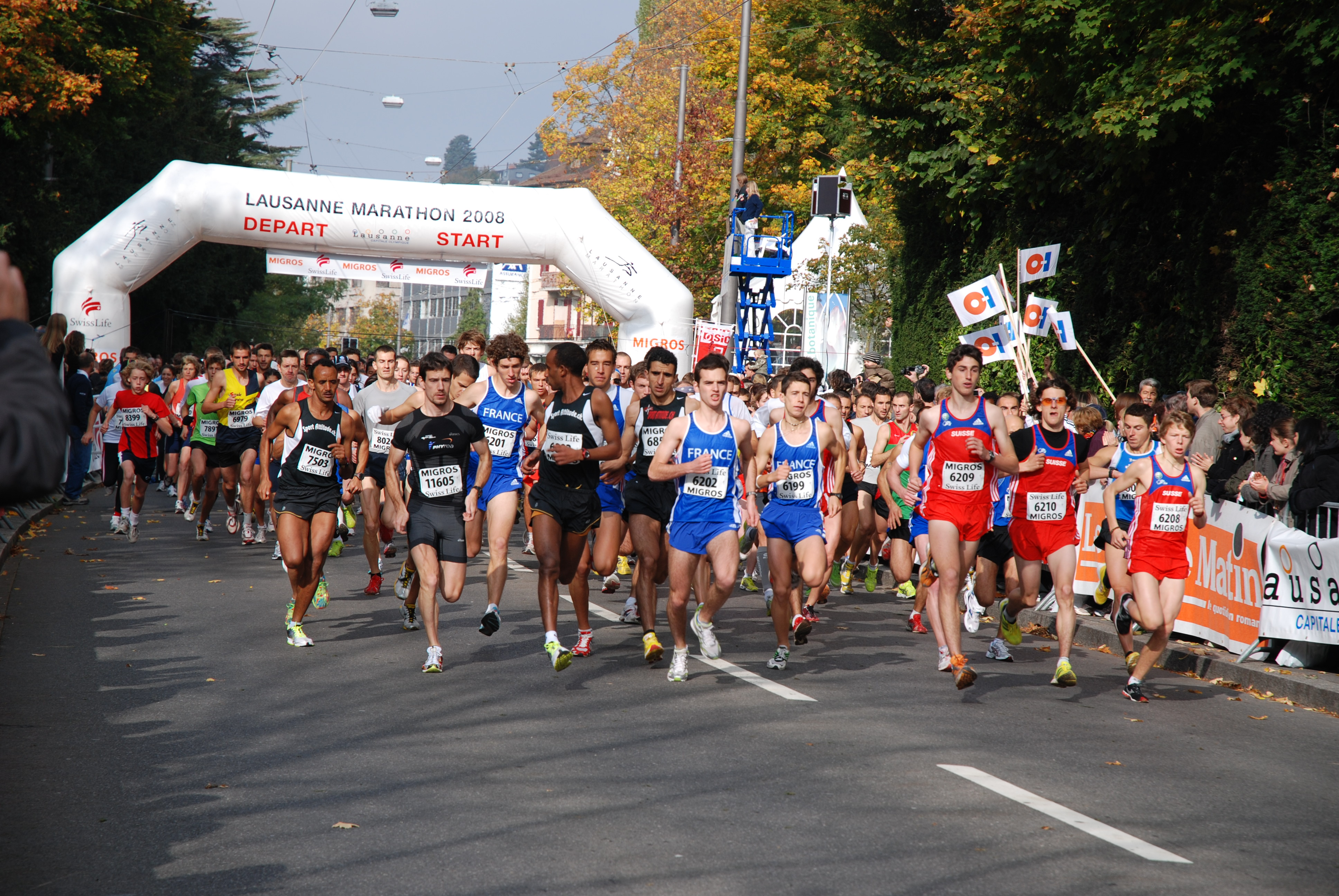 Maratón de Lausanne